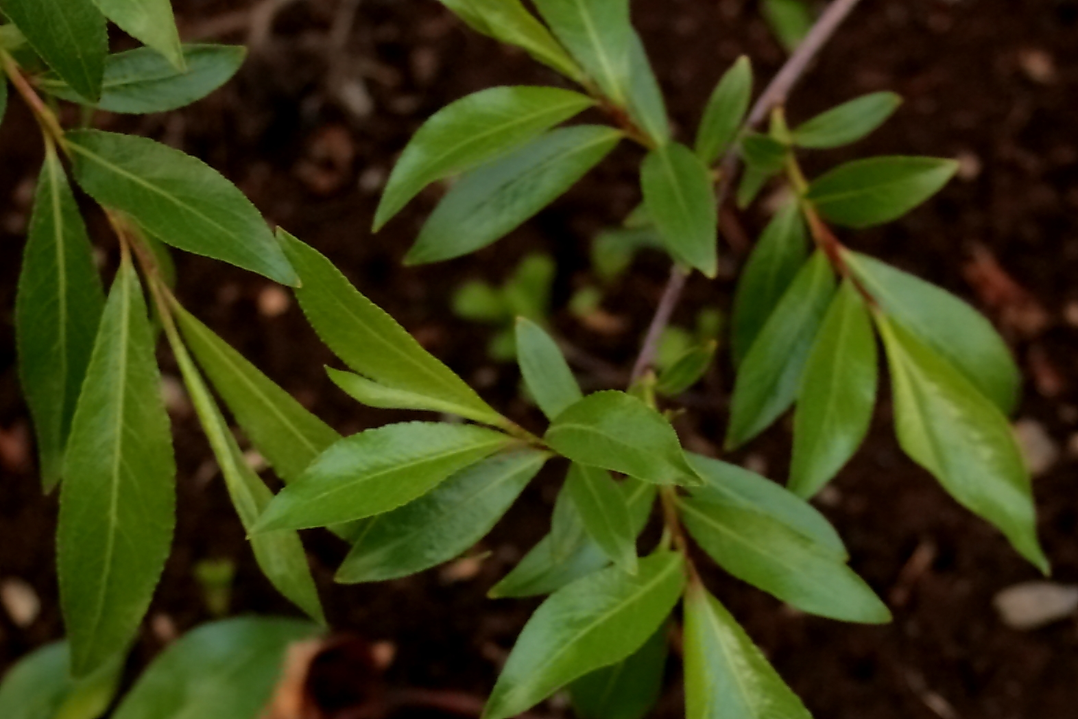 Ísland, Akureyri Botanical Gardens: Weide Salix_daphnoides